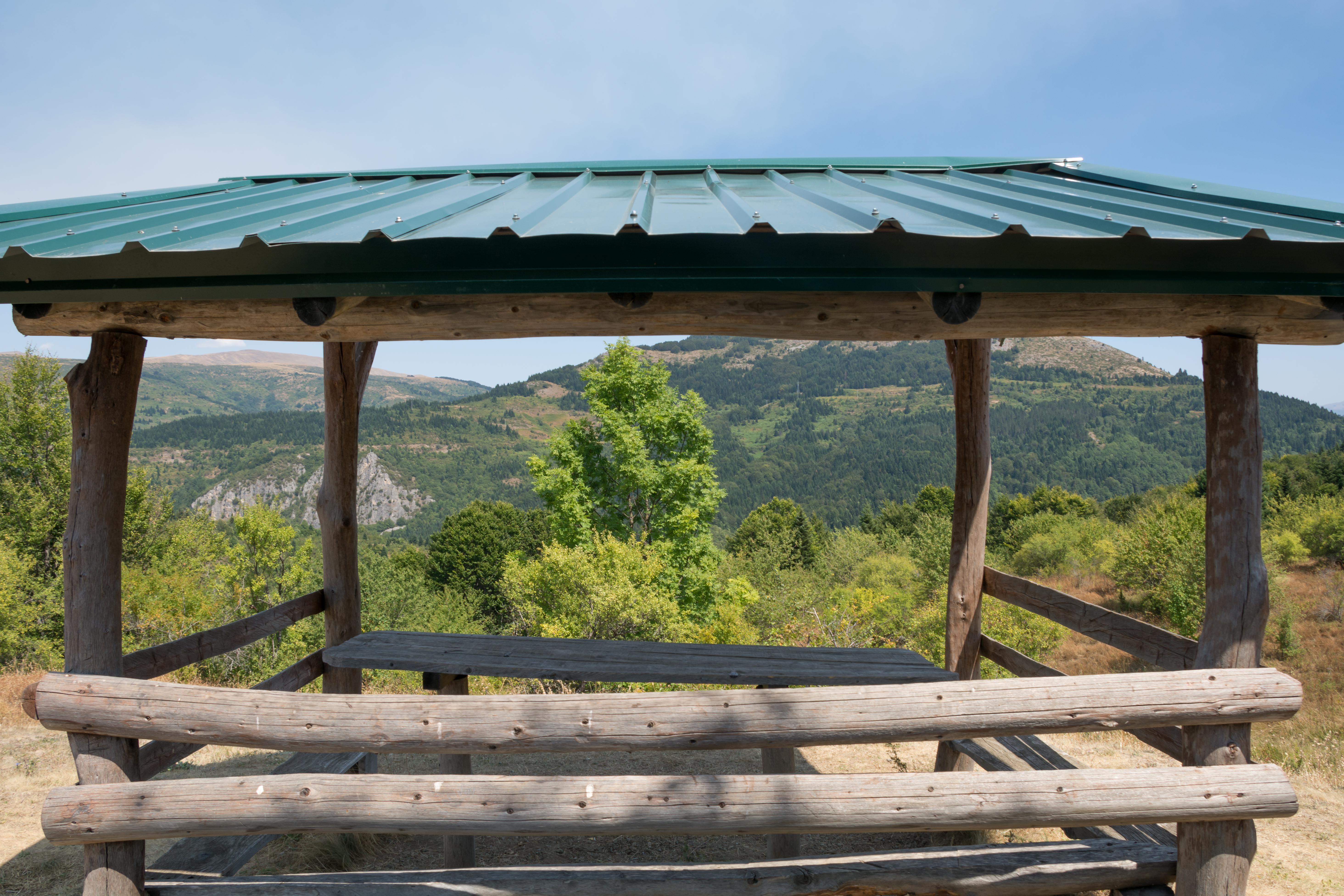 Видиковец со поглед кон Врбенски пат